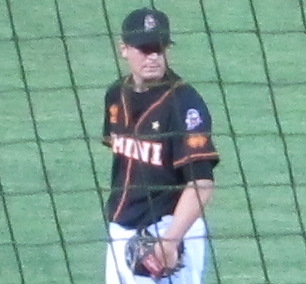 Mark DiFelice, lanciatore della Telemarket Rimini Baseball, opposto a Giovanni Pantaleoni della T&A San Marino. Nono ed ultimo inning di gara1 delle Italian Baseball Series 2012, ovvero la serie finale che assegna lo scudetto italiano.